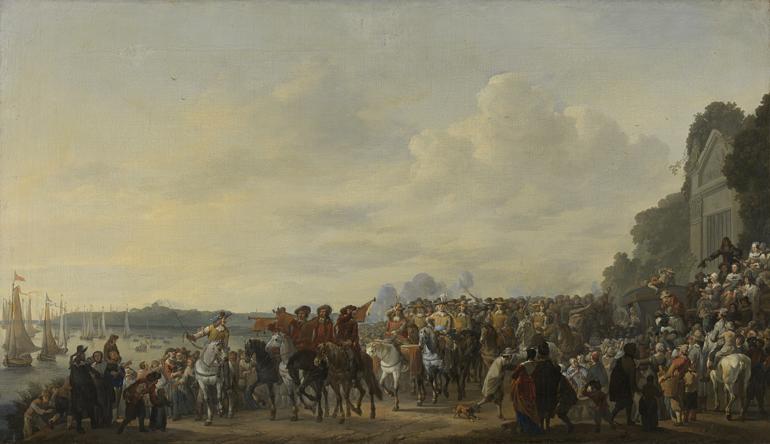 Het halthouden van Karel II, koning van Engeland, bij de buitenplaats Wema aan de Rotte tijdens zijn tocht van Rotterdam naar Den Haag, 25 mei 1660 ; of (minder waarschijnlijk) het halthouden van de oprukkende troepen bij de buitenplaats Welna aan de Amstel tijdens de aanslag van prins Willem II op Amsterdam, 31 mei-4 augustus 1650. Een lange stoet van ruiters wordt voorafgegaan door herauten en tamboers. Links en rechts is de bevolking toegestroomd om het schouwspel gade te slaan. Links een rivier met boten. Rechts een gebouw met op de gevel de naam beginnend met de letters WEL. Pendant van SK-C-1224.